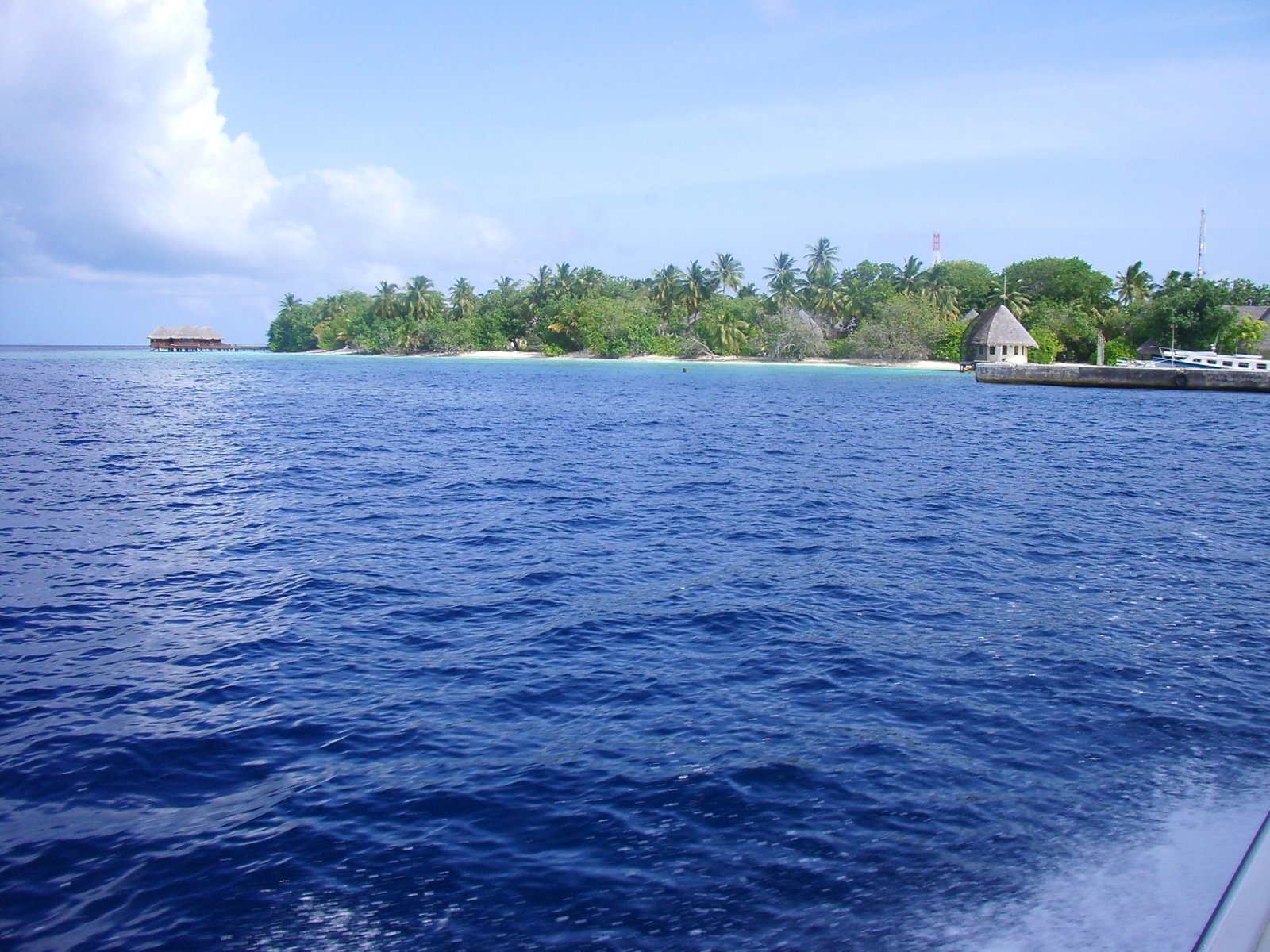 Illa de Bandos, North Male Atholl, Maldives; foto feta per J. Ollé el juiol del 2006.